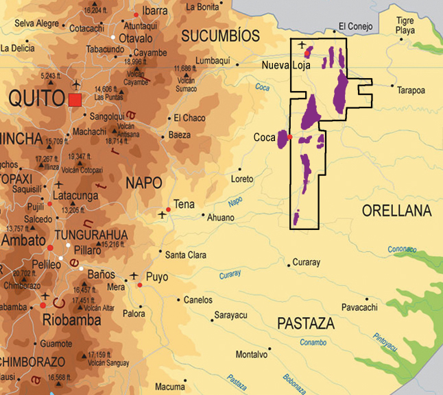 Karte der Ölkatastrophe im Nordosten Ecuadors, Texaco-Gulf-Cepe